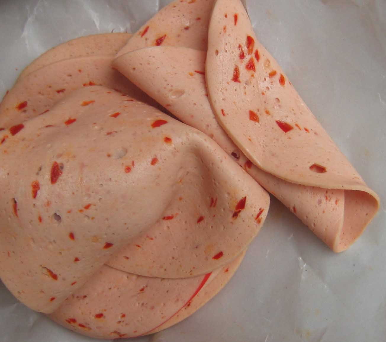 Aufschnitt